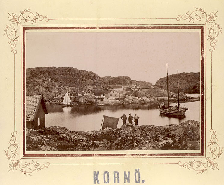 Fiskeläge. Från ön Svensholm vid hamninloppet. Lyse 322:1. Motiv: Lilla Kornö Nyckelord: Riksintressen Kategori: Fiskeläge Fiskeläge. Från ön Svensholm vid hamninloppet. Lyse 322:1.